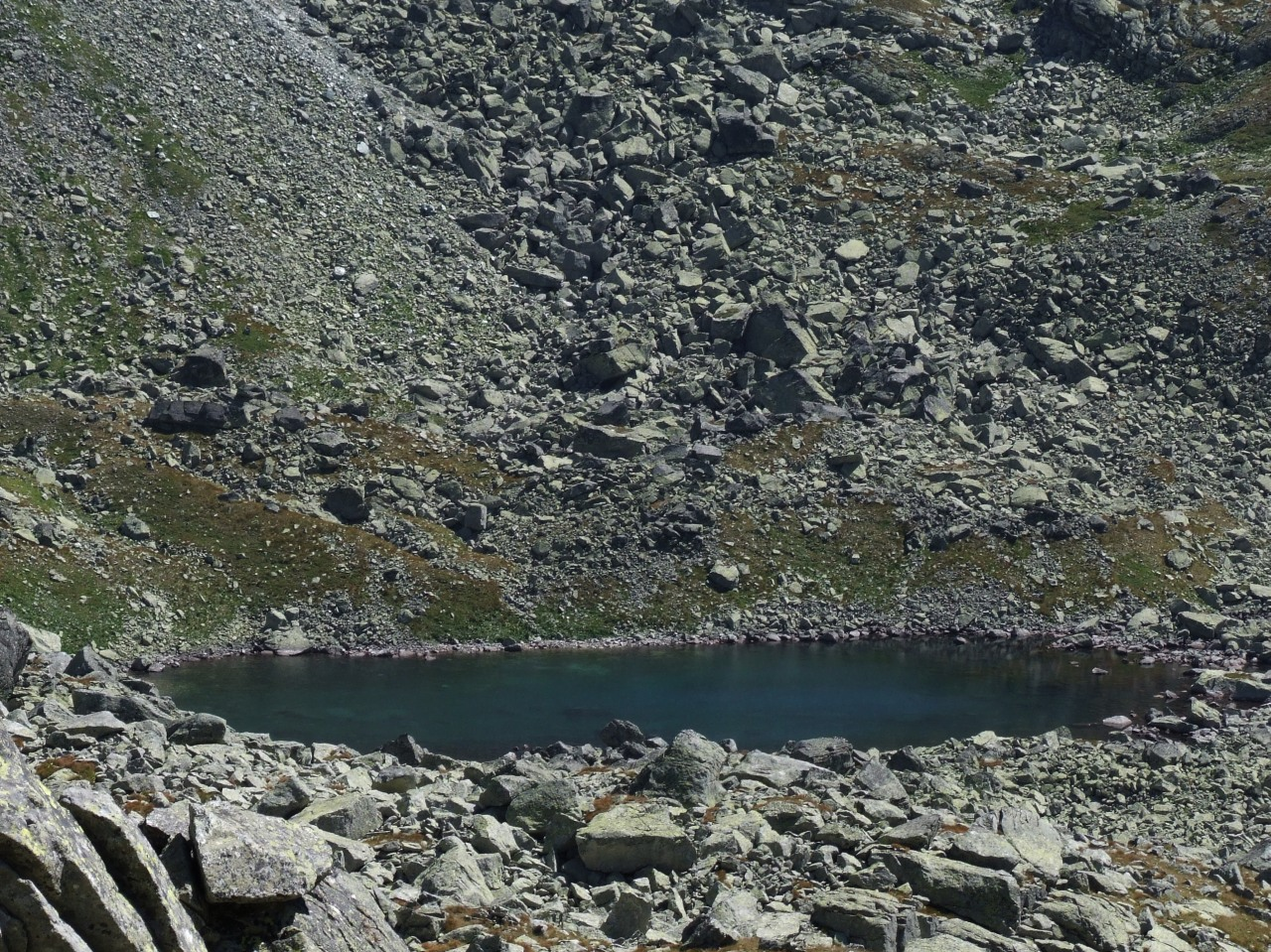 Niżni Kozi Staw (Dolina Młynicka, Tatry)